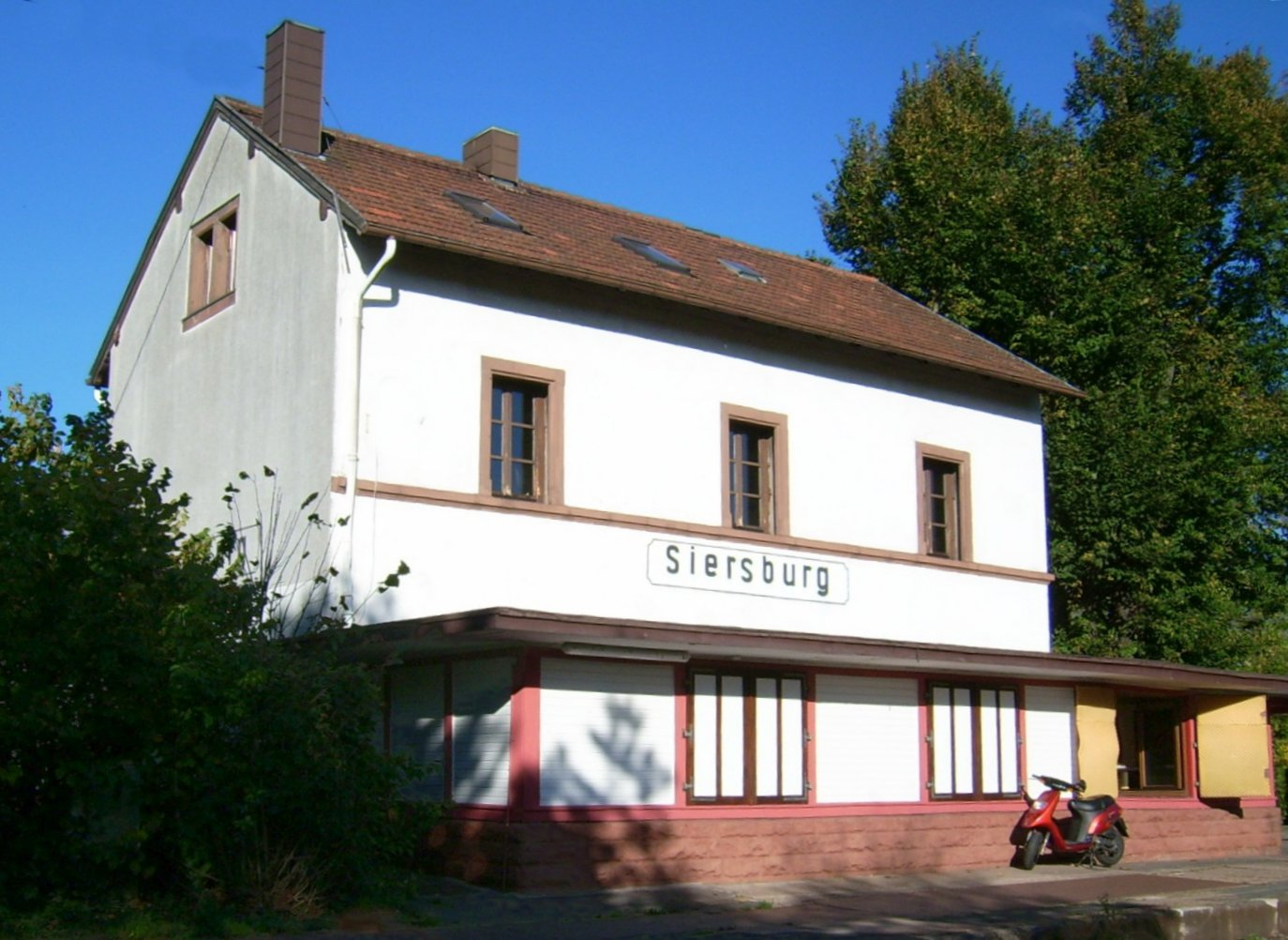 Bahnhof in Siersburg